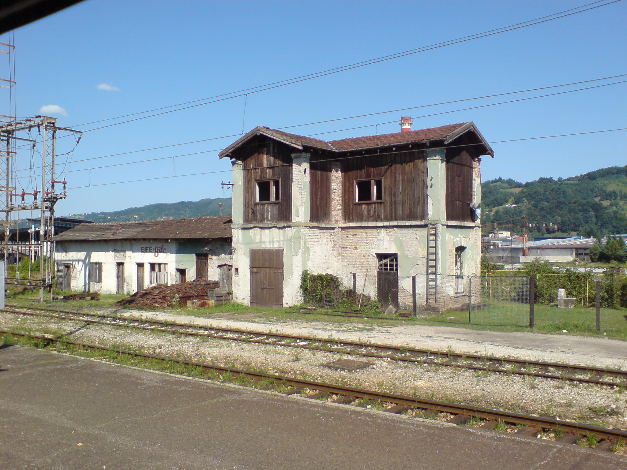 Zavidovići freight depot station, Bosnia and Hercegovina